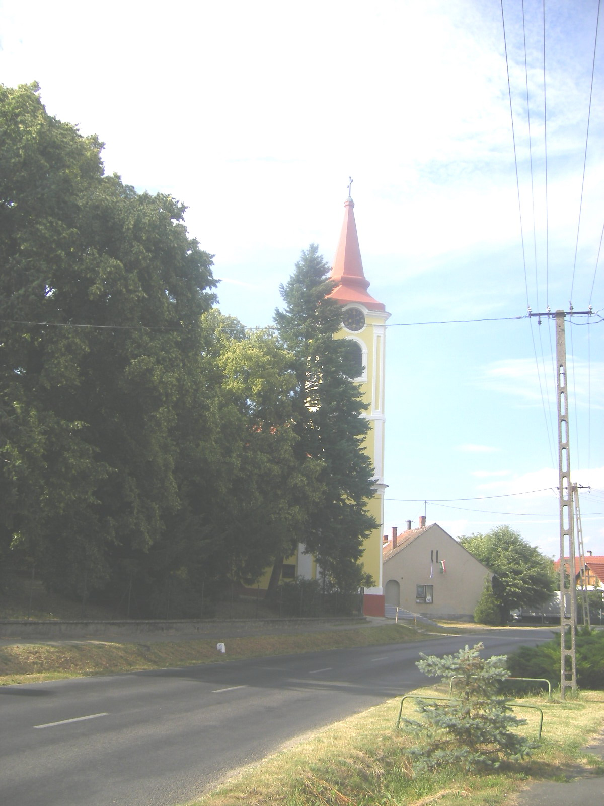 Nyőgér